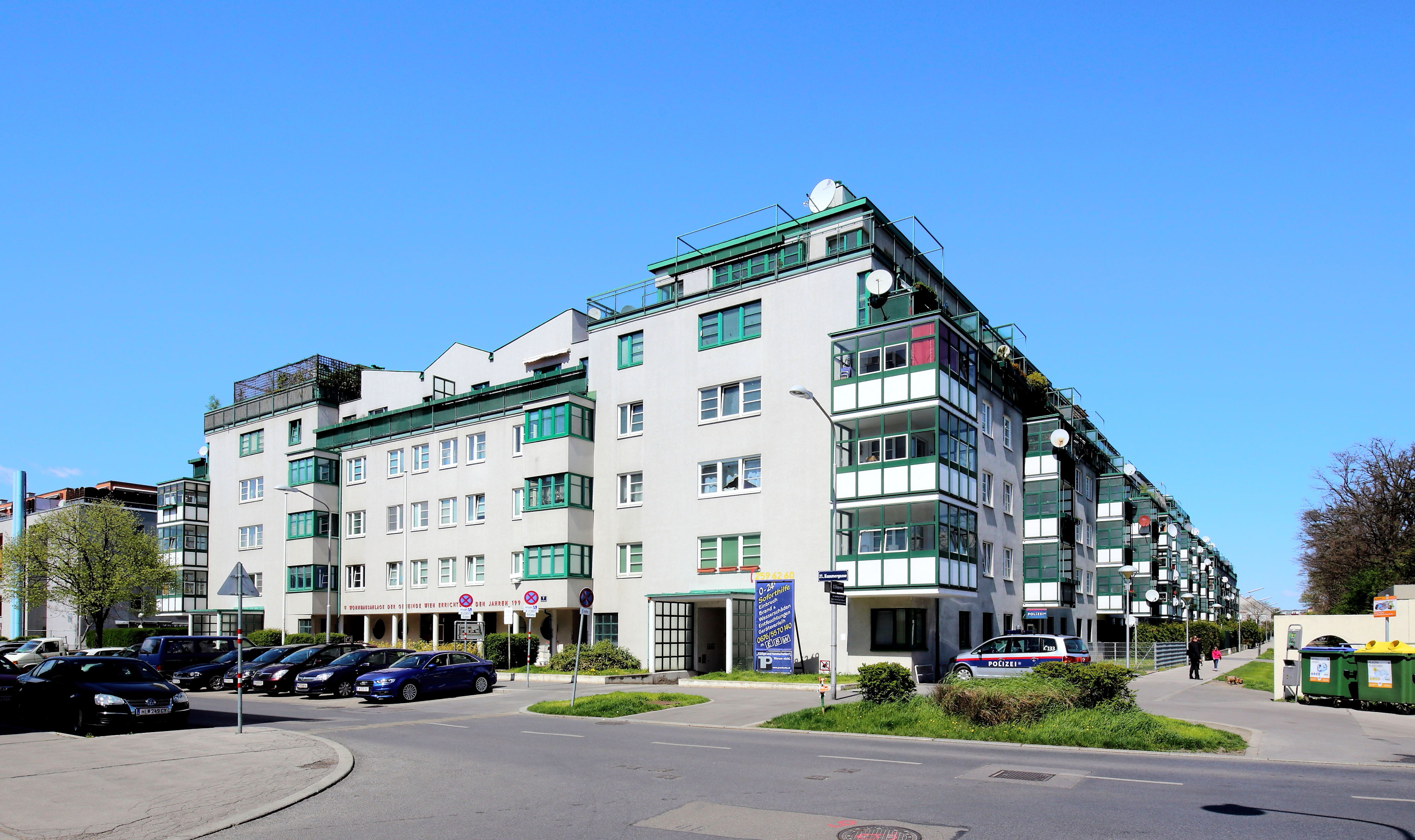 Die in den Jahren von 1993 bis 1995 nach Plänen von Viktor Hufnagl errichtete Wohnhausanlage „Otto-Felix-Kanitz-Hof“ der Gemeinde Wien in der Kummergasse 7 / Regnerweg 1 / Dattlergasse 8 in Stammersdorf, ein Ortsteil im 21. Wiener Gemeindebezirk Floridsdorf. This media shows the Vienna residential building (Gemeindebau) with the ID 1527.